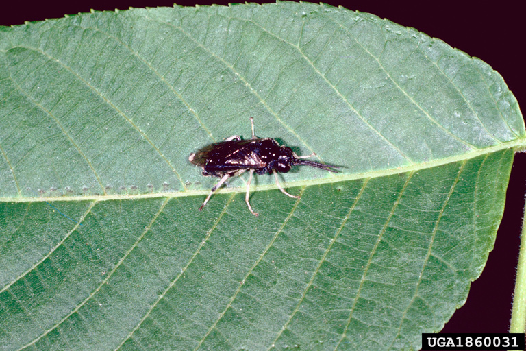 Femelle de tenthrède lanigère du noyer (Eriocampa juglandis) en train de pondre sur une foliole de noyer noir.